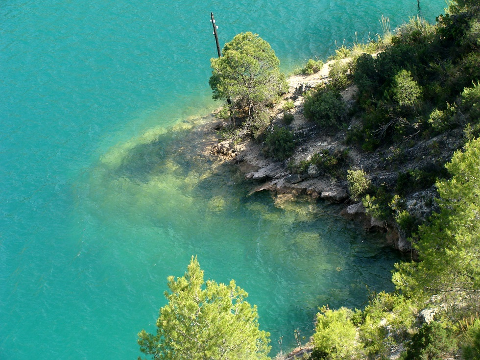 Ribera izquierda del río Júcar en el embalse de Cortes de Pallás donde se muestra el color típico de las aguas de este río, desde su cuenca superior en la Serranía de Cuenca.